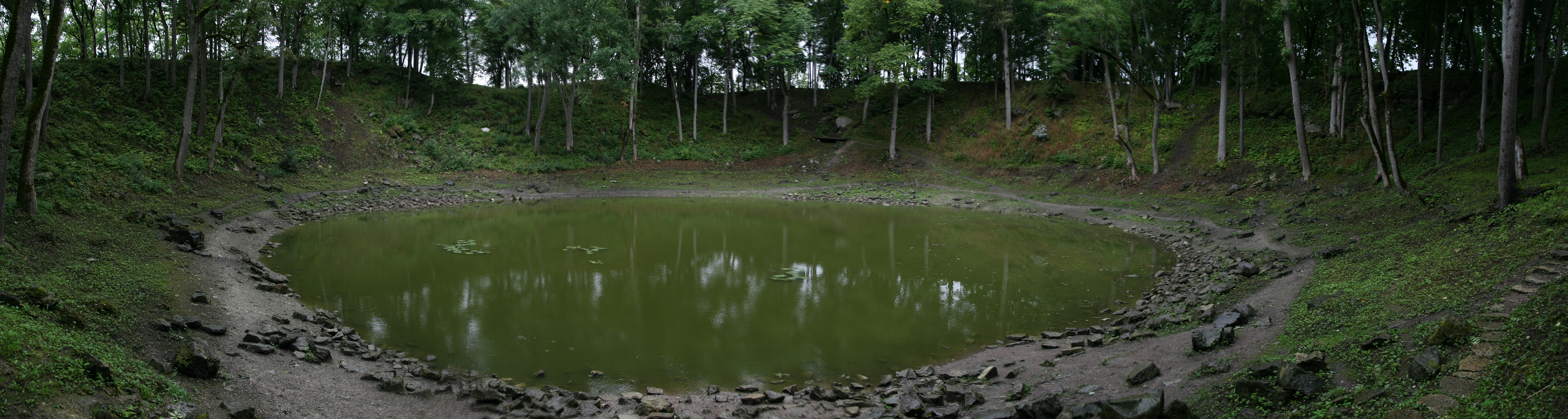 Kaali meteorite crater in Saaremaa (Kaali)